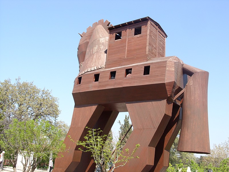 Troia - Cavallo di Troia